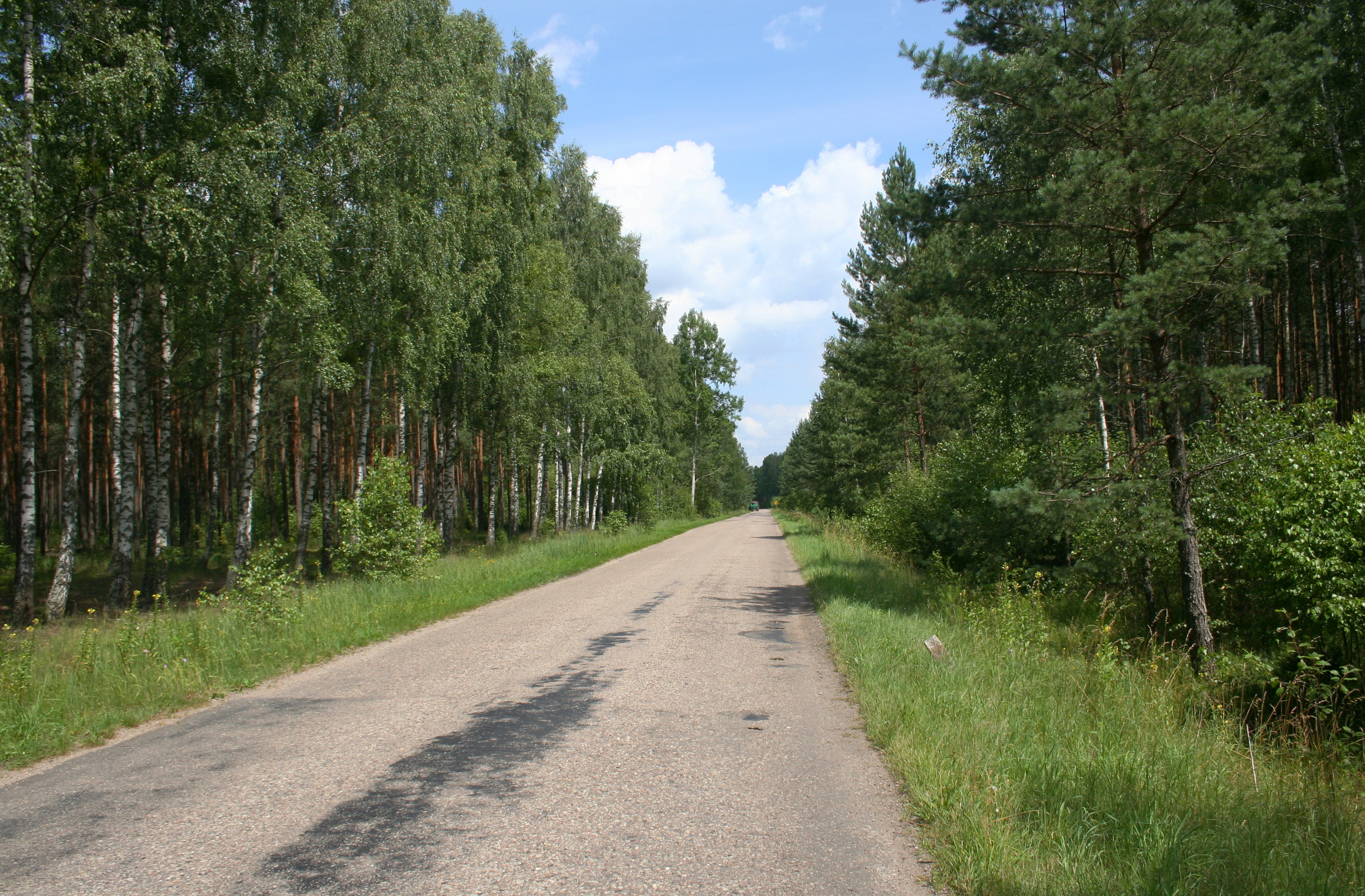 Podlaski Szlak Bociani (Bociani Szlak rowerowy), droga między miejscowościami Narew i Gorędy, woj. podlaskie